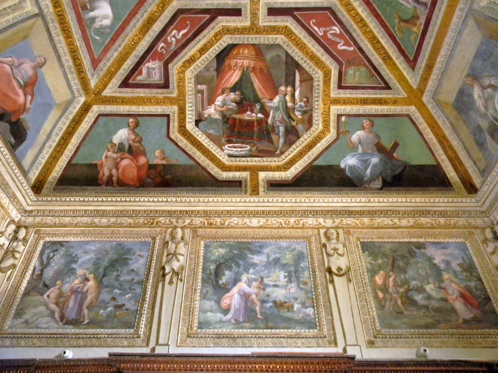 Scene dal Vecchio Testamento. Affreschi di Belisario Corenzio.